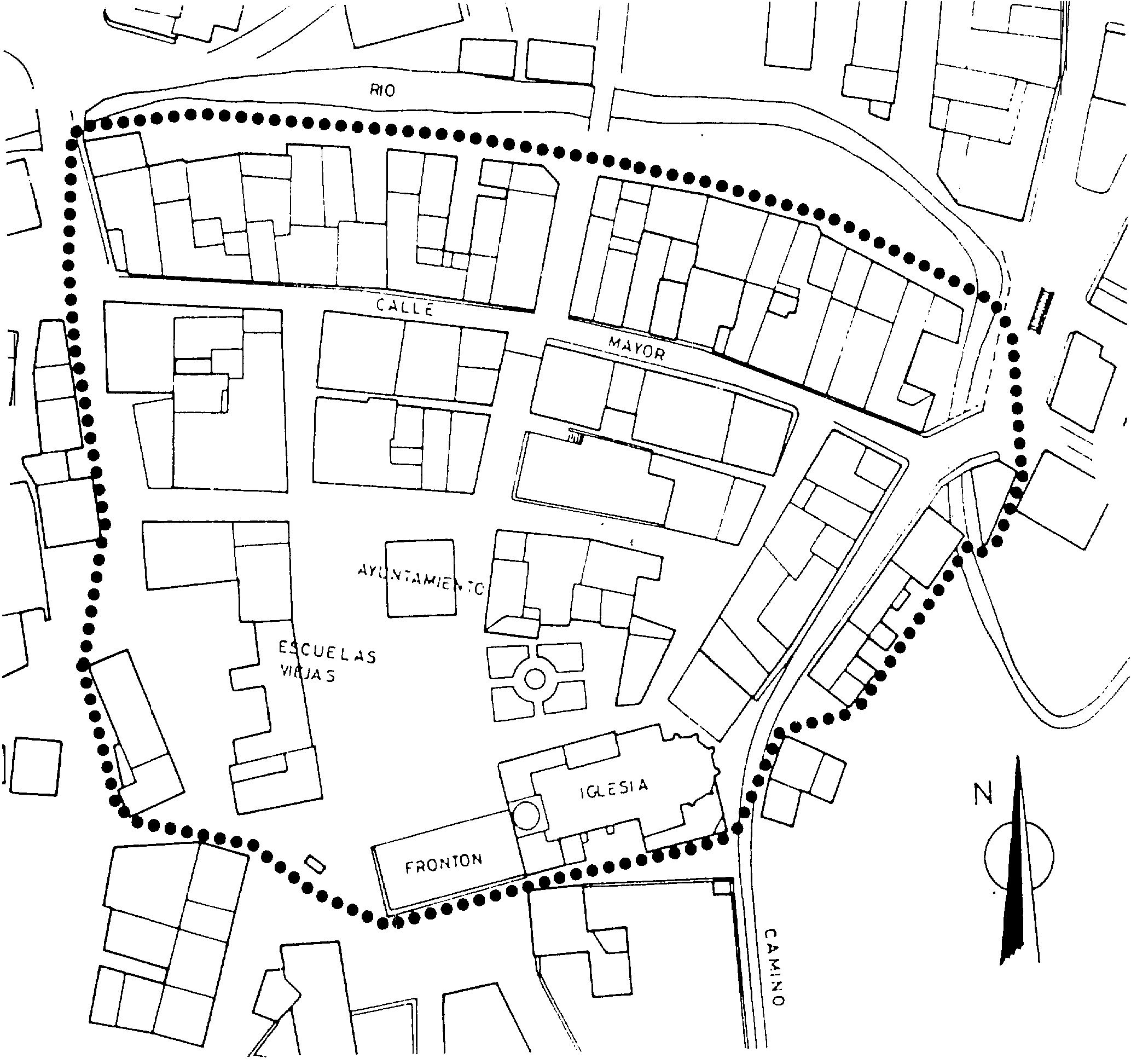 Dulantziko hirigune historikoa.